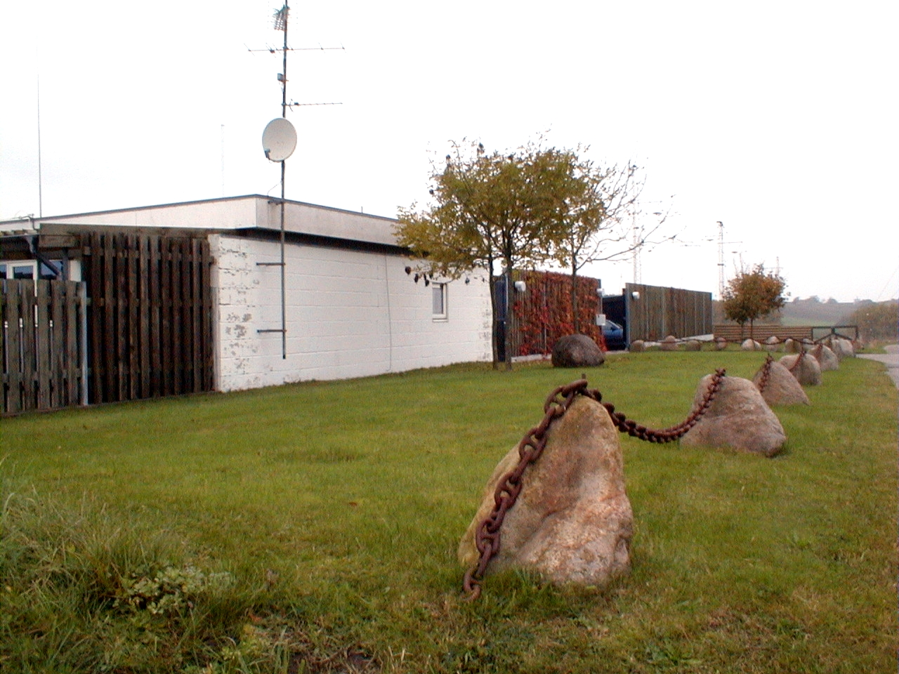 Senderstation Rishøj mellem Frederikshavn og Sæby er en af søværnets installationer i land. September 2004